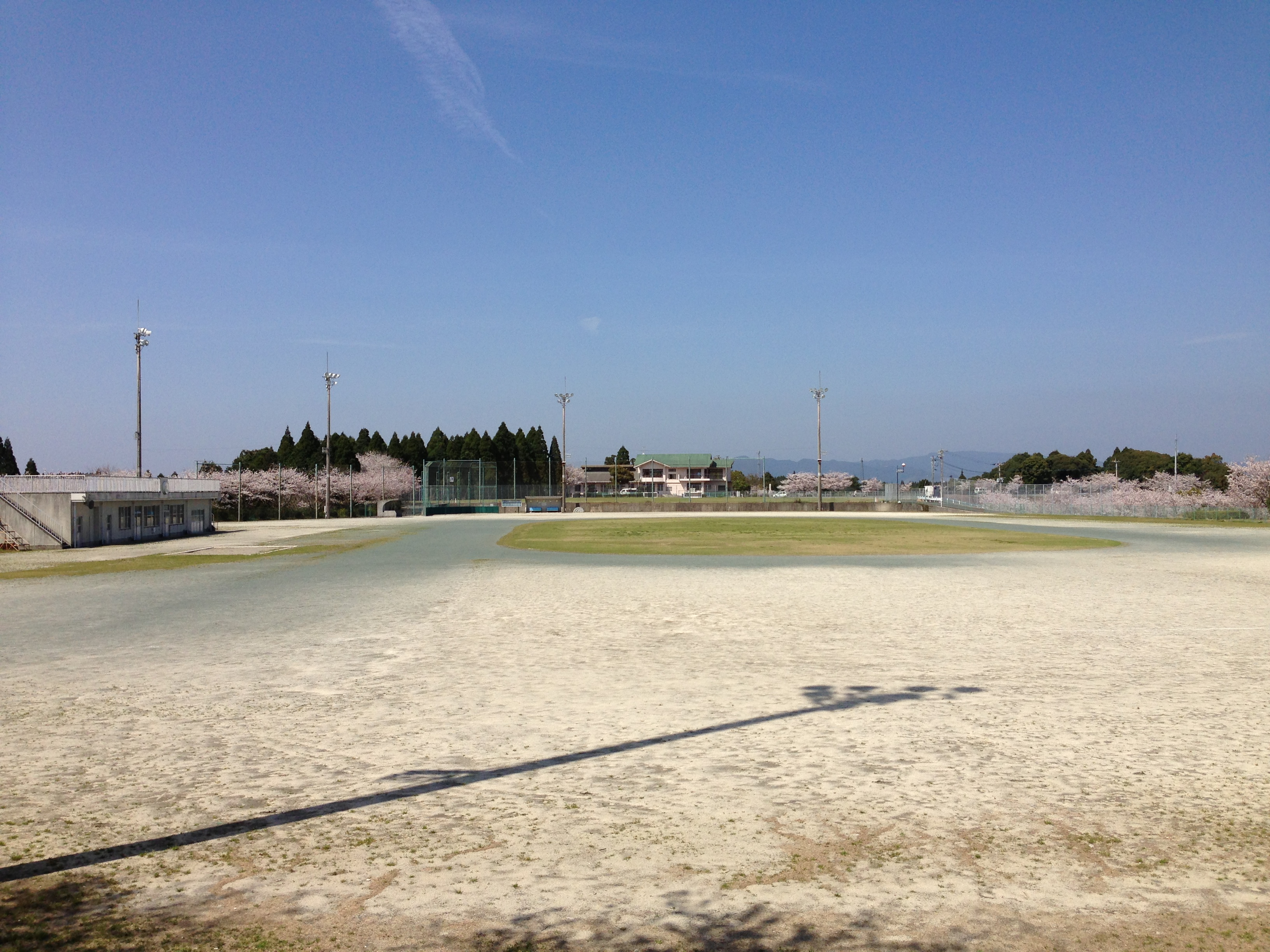 松元平野岡体育館のグランド。